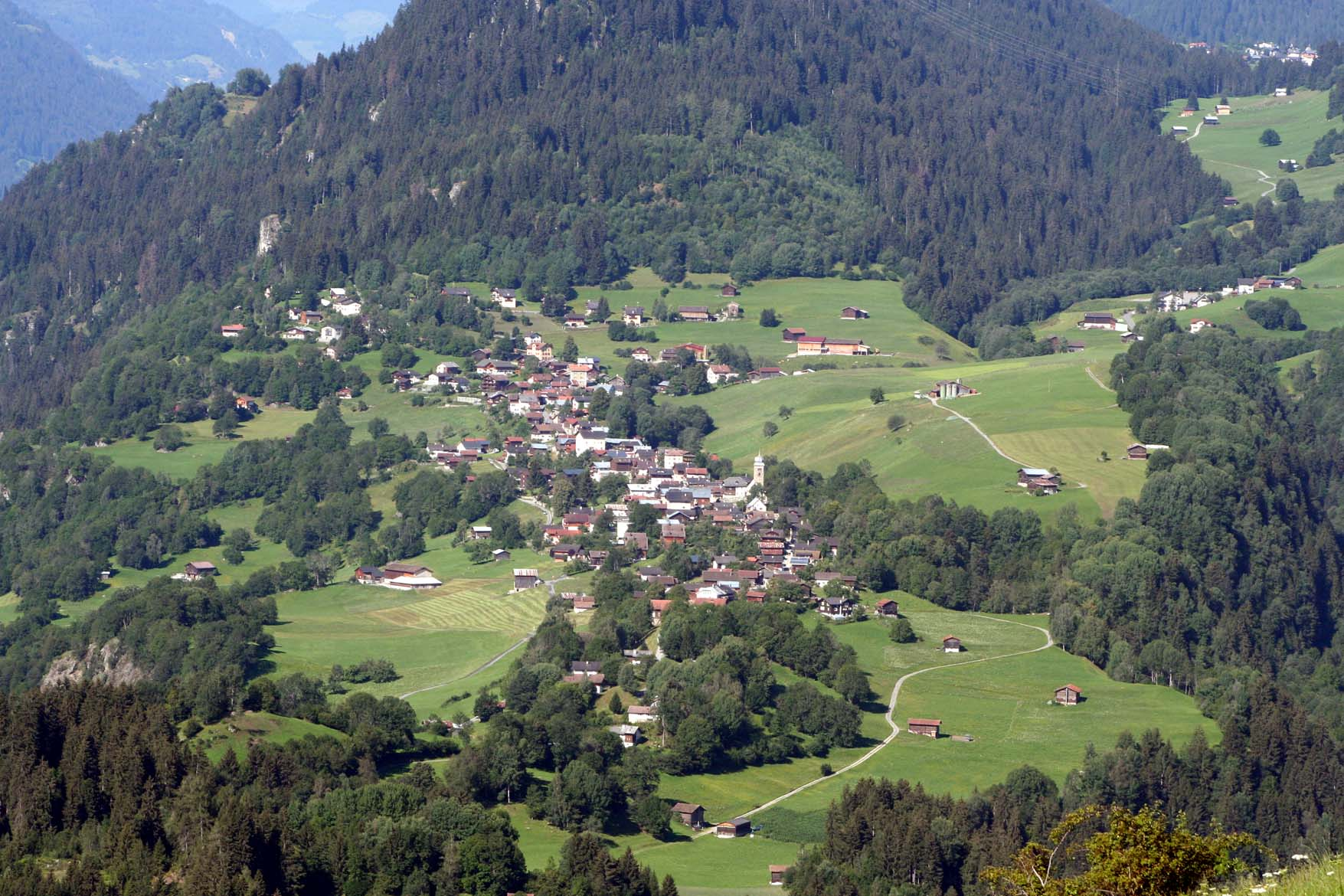 Waltensburg